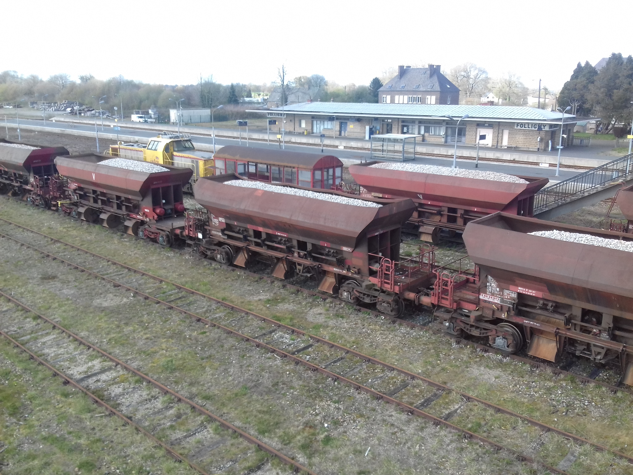 Gare de Folligny, Manche.